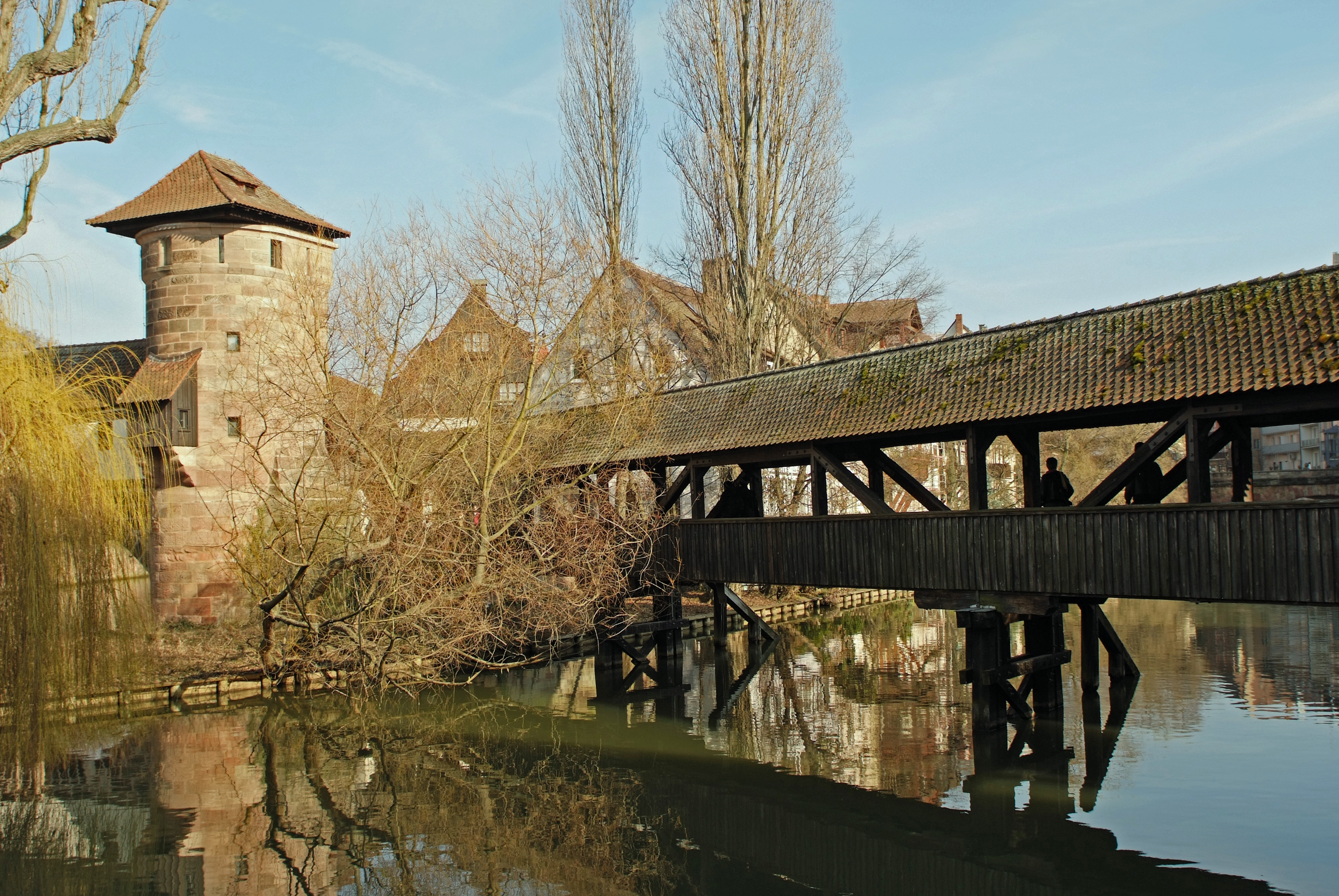 Nürnberg Henkerturm und Henkersteg, Nürnberg